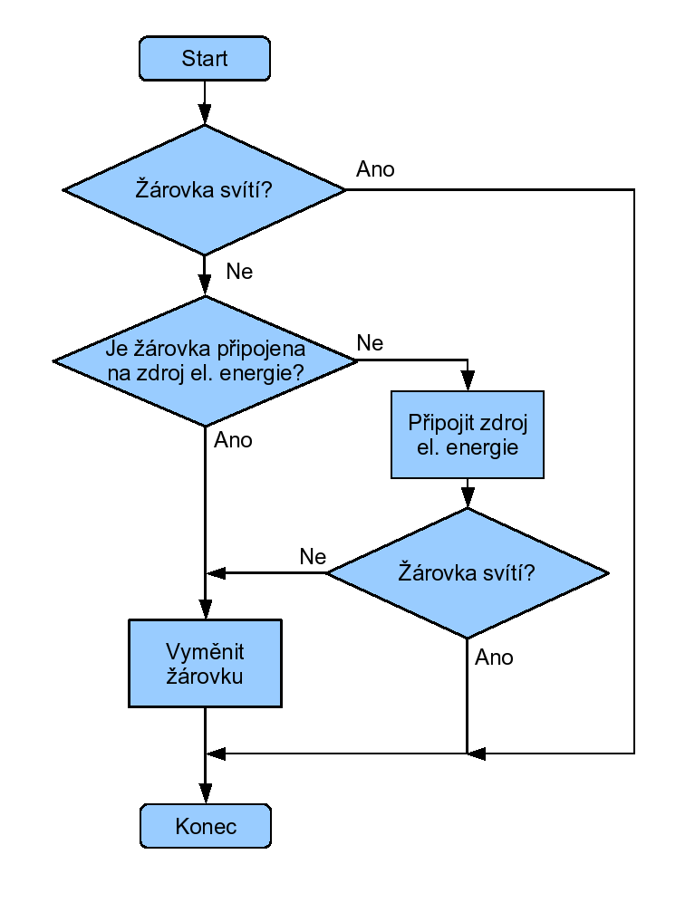 Vývojový diagram žárovka